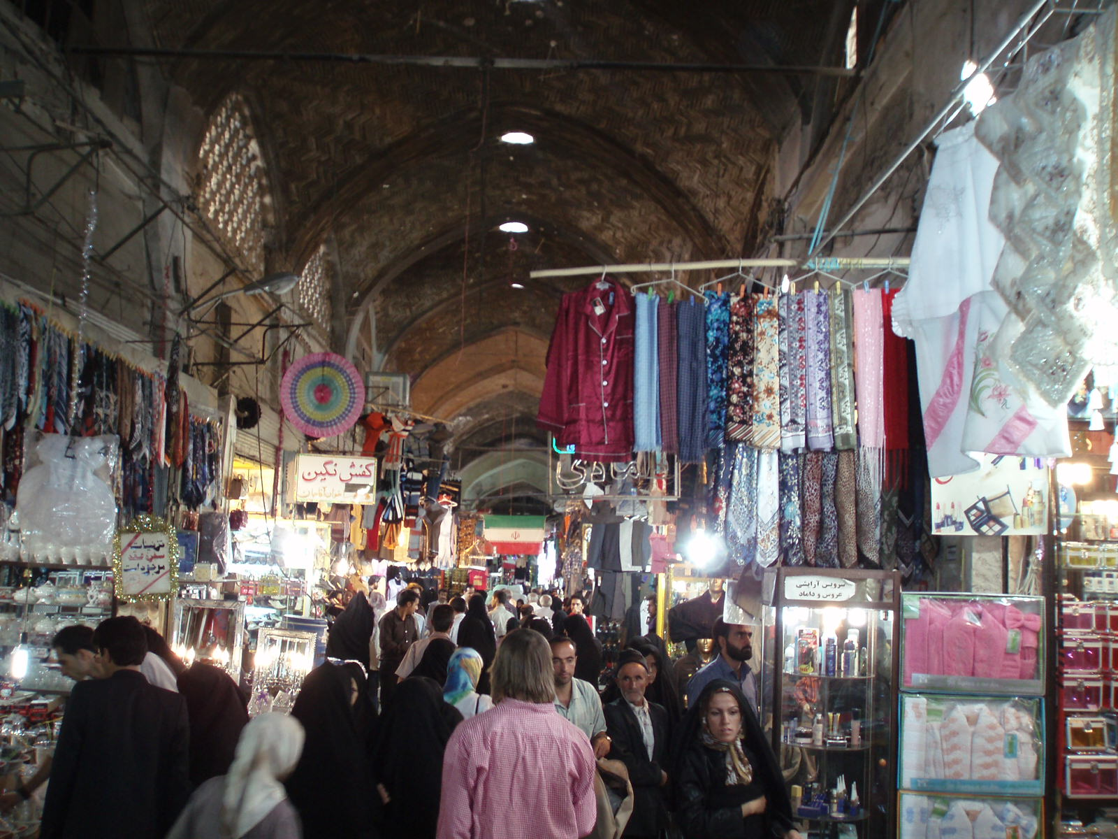 Iran 2007 223 Isfahan bazaar